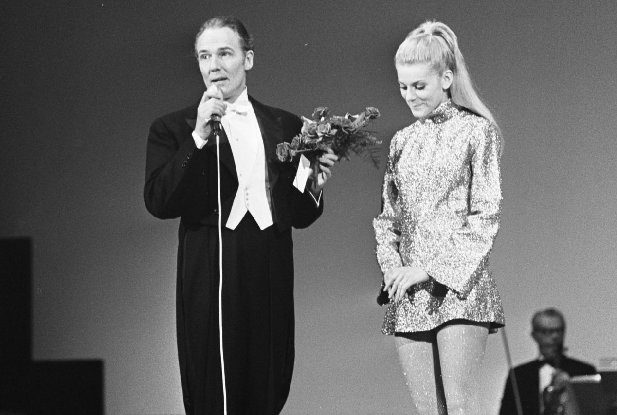 Guus Oster en Peggy March, Grand Gala du Disque Populaire in Congrescentrum